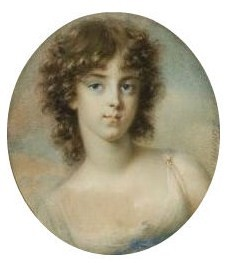 Софья Дмитриевна Нарышкина (1808—18.06.1824) Jean-Urbain Guerin. Portrait of a young lady. c. 1800. 6,6x5,8. Novgorod State Museum. Inv. no 27758/19